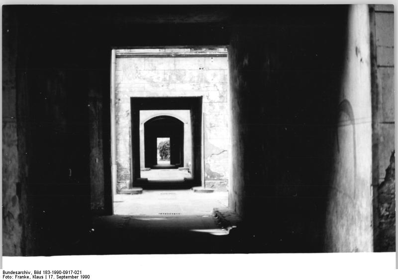 ADN-Klaus Franke-17.9.90-Berlin: Schloß-Trümmer-Durch drei Hinterhöfe in der Kastanienallee 12 musst du geh'n - um in einer grünene Oase inmitten von Altbauten zu steh'n. Eine Gruppe Bildhauer gestaltete den Hof mit dekorativen Stuckteilen, Architekturdetails und Säulen vom 1950 abgerissenen Berliner Schloss, die sie von einer Müllhalde im Ahrenfelder Waldherangeschafft hatten.